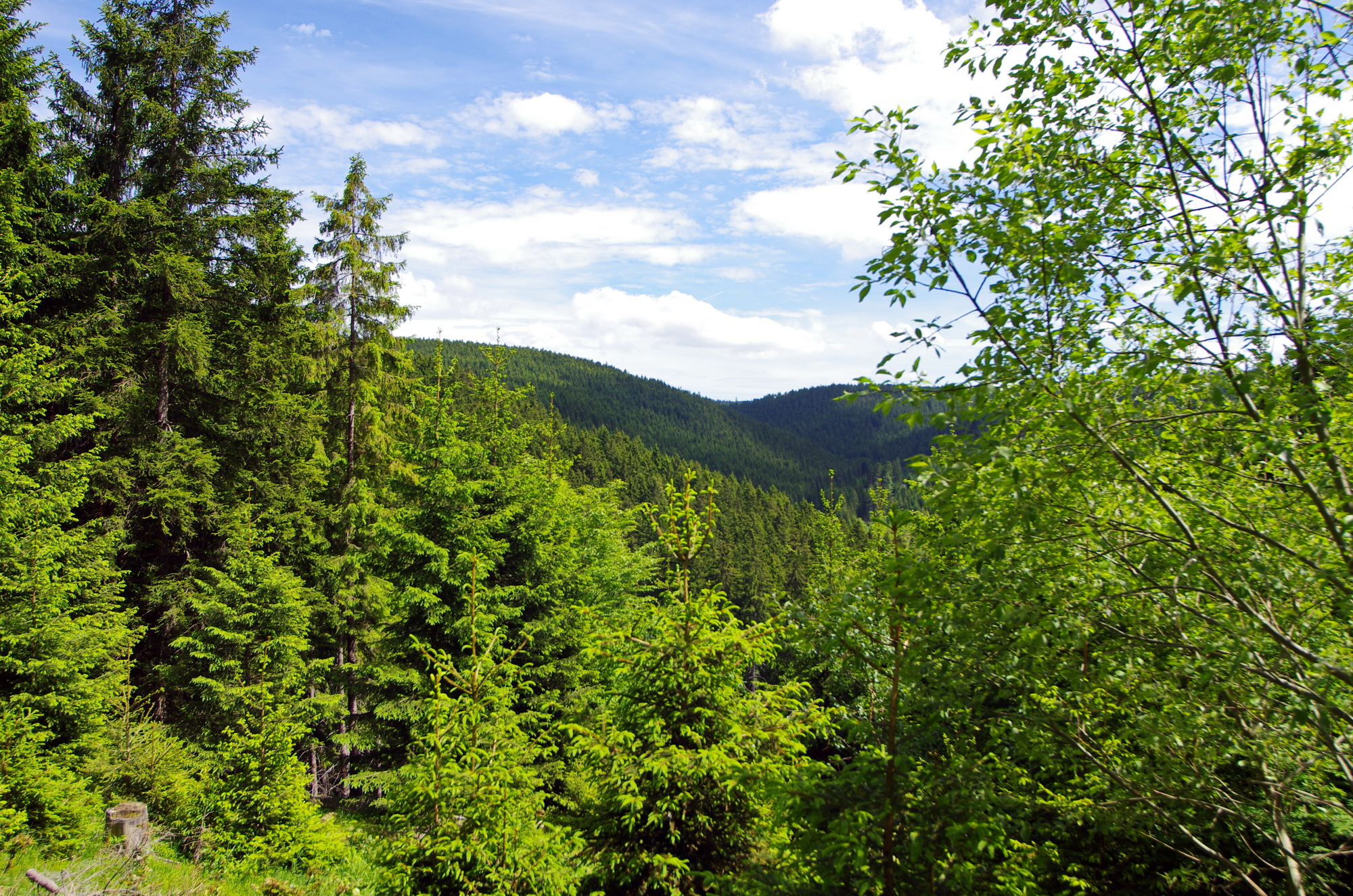 Zlatý kopec, pohled z Kaffenberské cesty, okres Karlovy Vary